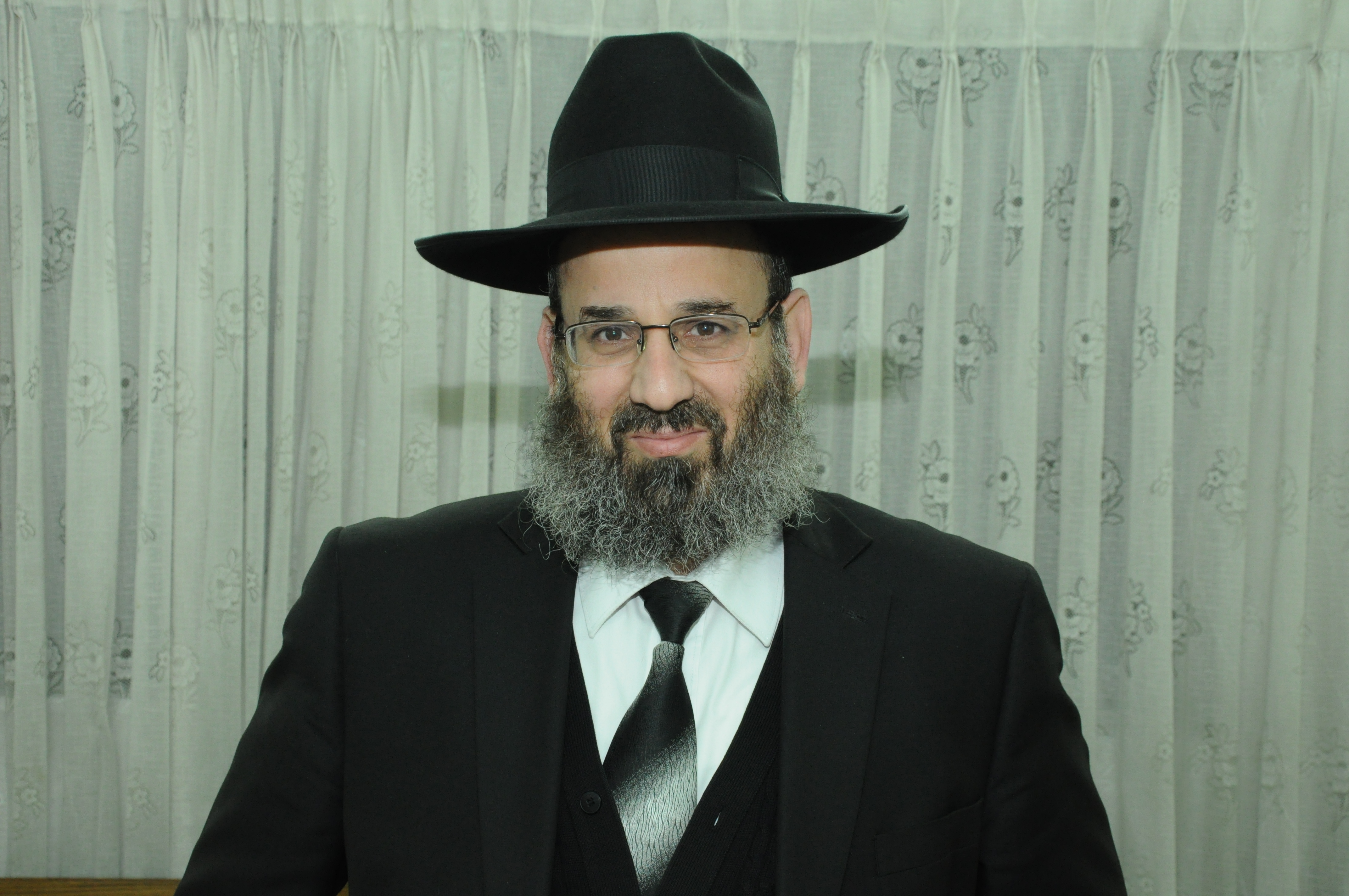 הרב ראבד ראש בית המדרש לתורת ארץ ישראל פתח תקווה